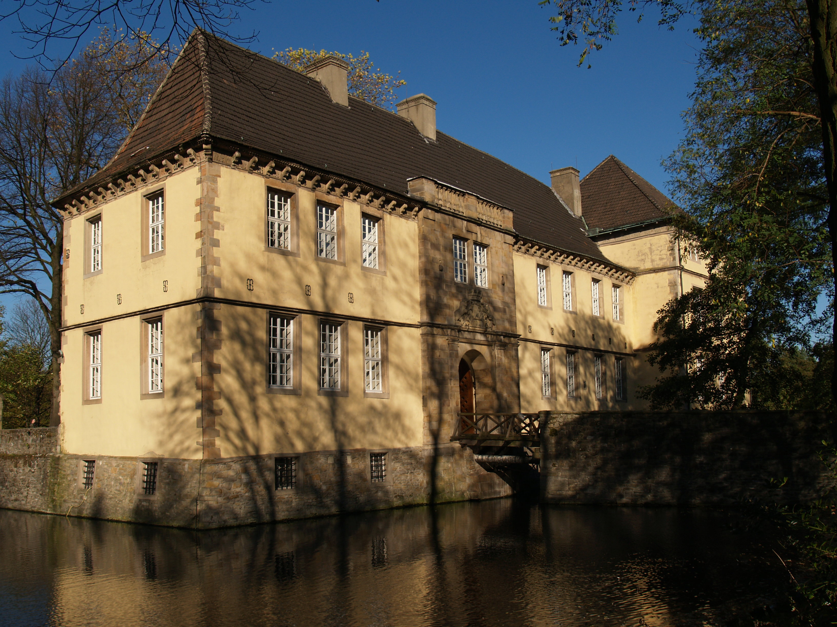 Schloss Strünkede, Ansicht von Südwest mit Brücke über die Gräfte und Tor zum Schlosshof